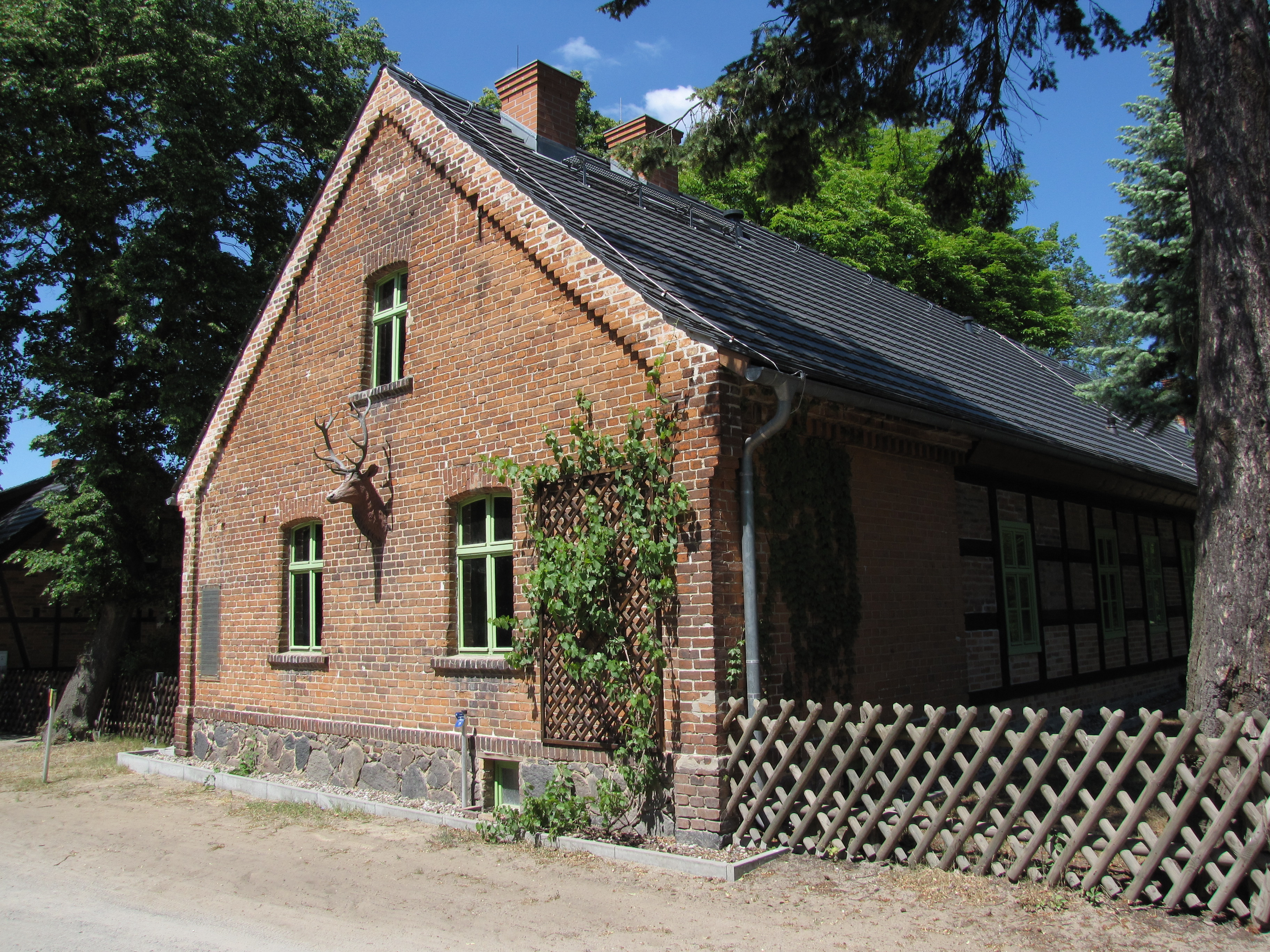 Straßenfront des Forsthaus in Zesch am See, Ortsteil Lindenbrück, Stadt Zossen, Brandenburg, Deutschland